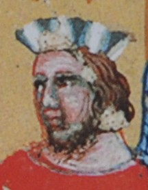 Břetislav I.